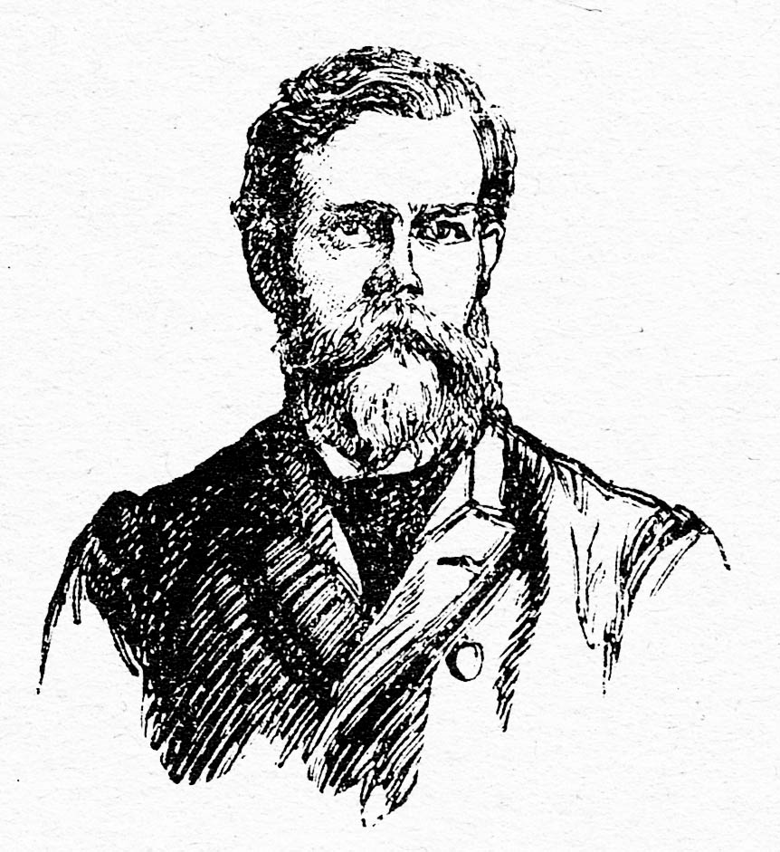 Franz Schrader, par Charles Jouas. Vignette de couverture, tome V de "Cent Ans aux Pyrénées", de Henri Beraldi.